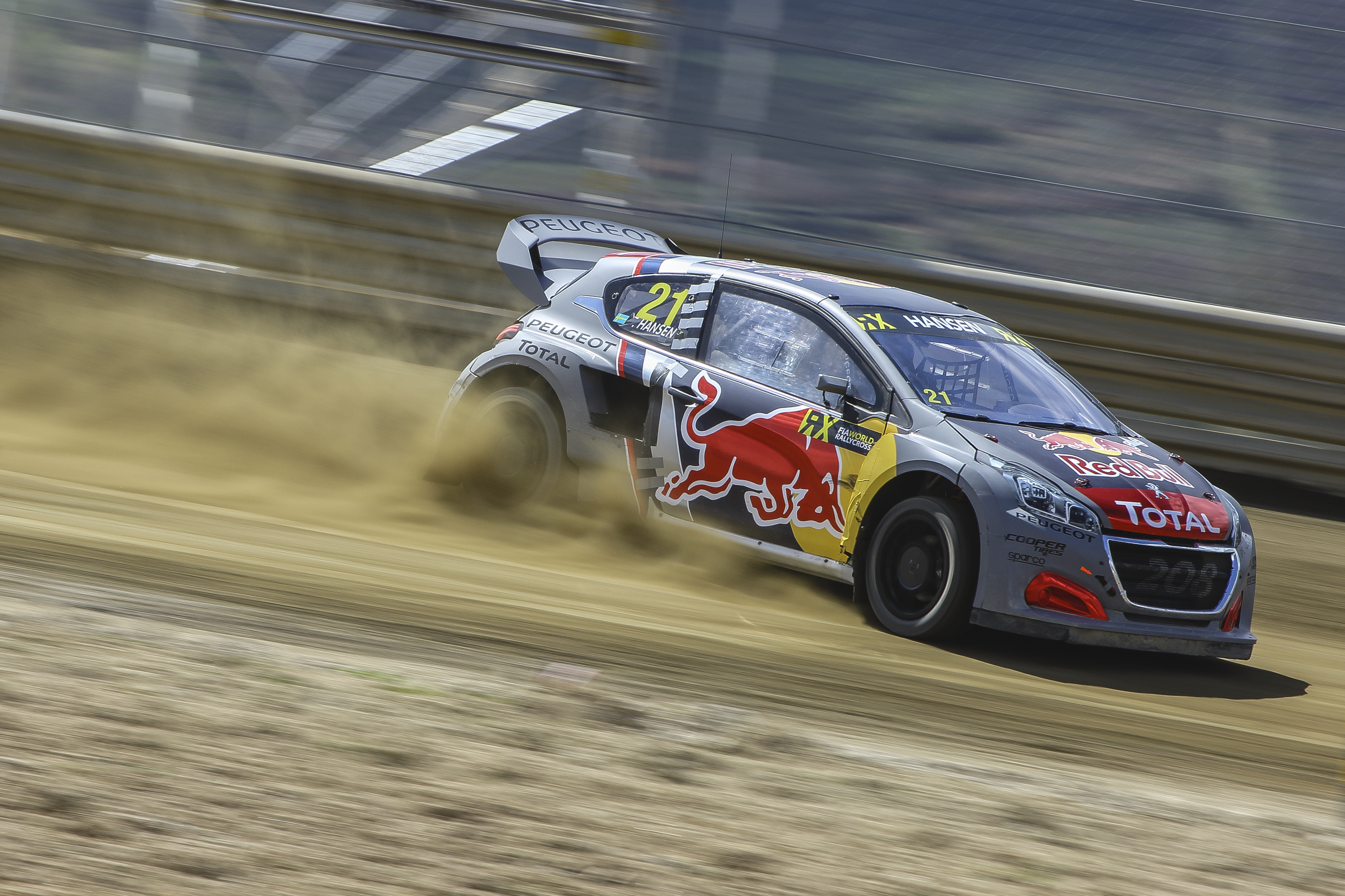 Johan Kristofferssonganó en la final en Portugal, tras hacerlo en España, el Sueco se afianza en el liderato provisional del Campeonato. Sin embargo no fue el mejor en las mangas de entrenamiento que fueron dominadas por Andreas Bakkerud.